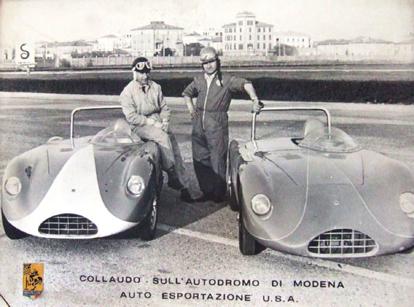 Bandini 750 sport internazionale "saponetta"